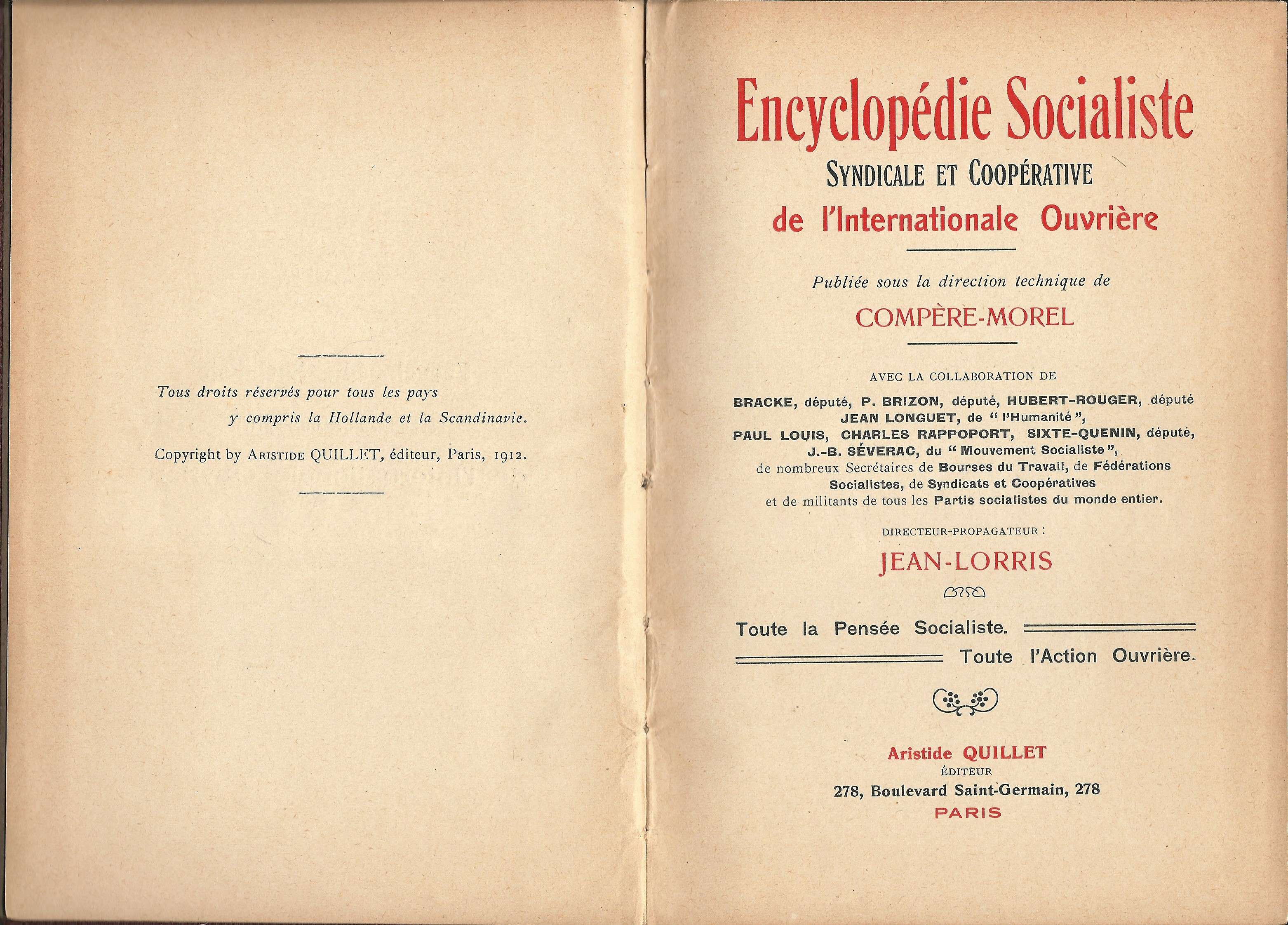 Frontispice de l'"Encyclopédie socialiste, syndicale et coopérative de l'Internationale ouvrière", sous la direction technique de Compère-Morel, directeur-propagateur Jean-Lorris, Paris : Éditions Aristide Quillet, 1912